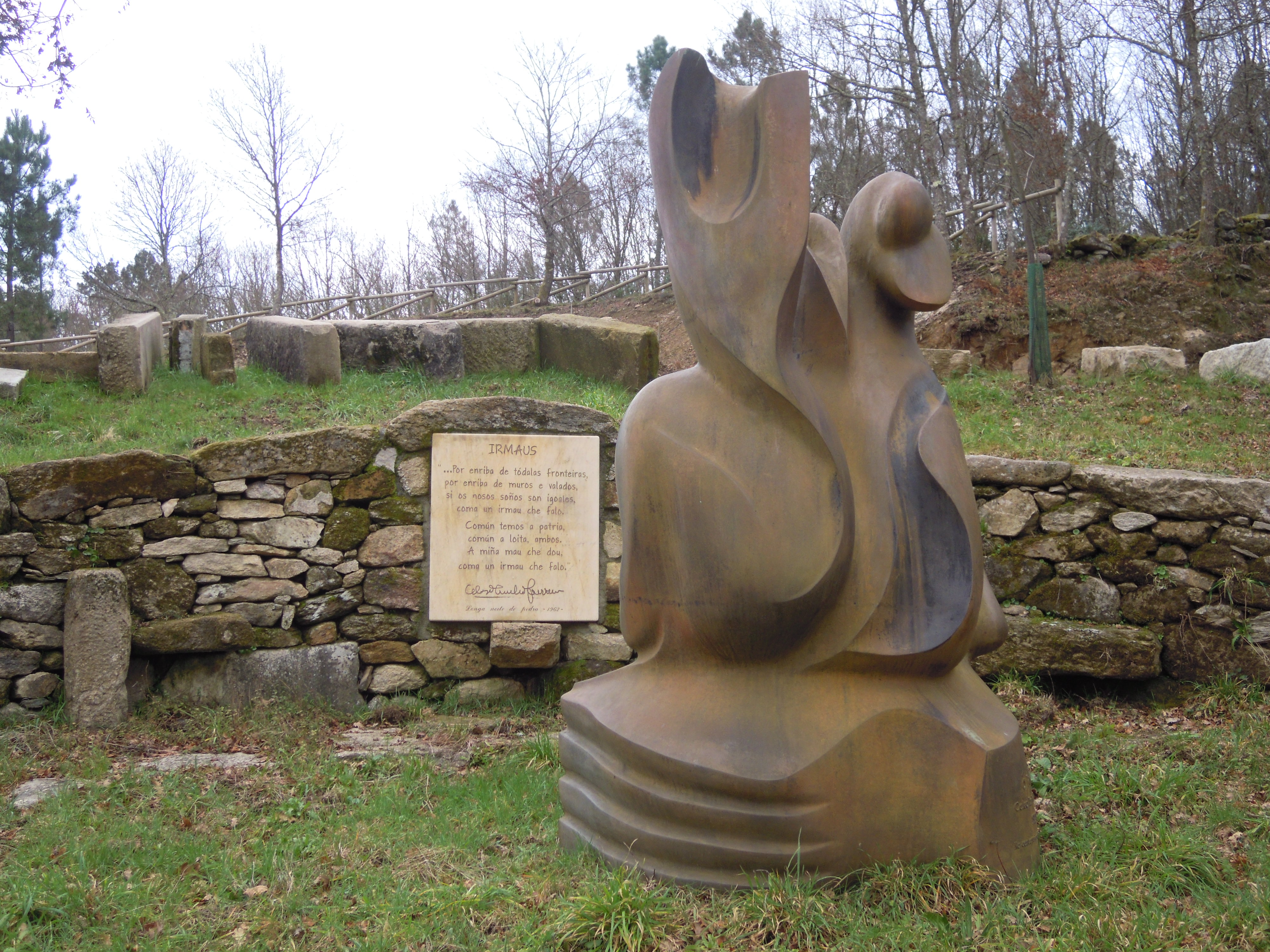 Escultura en homenaxe a Celso Emilio Ferreiro na Insua dos Poetas